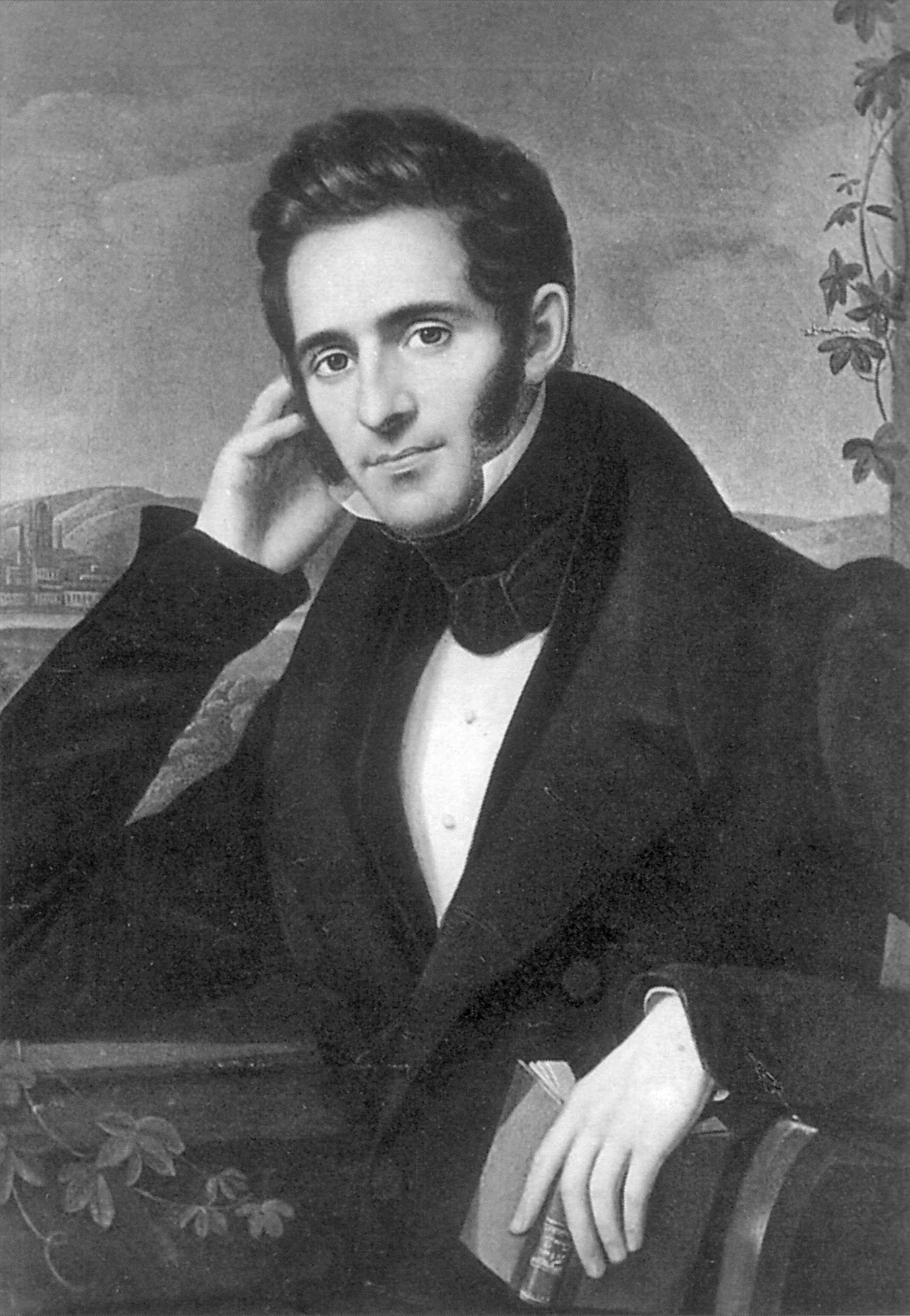 Porträt Conrad Wilhelm von der Leyens (1792-1873)